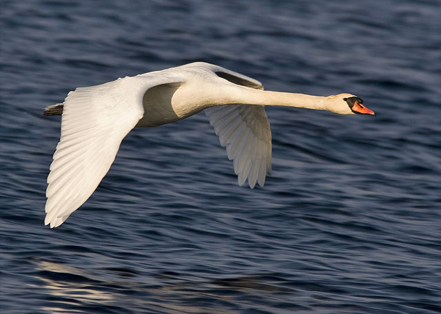 Knölsvan (Cygnus olor)